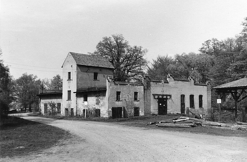 Original image description from the Deutsche Fotothek Lohsa-Weißkollm. Schneidemühle, Ansicht